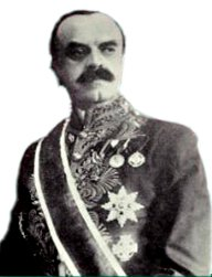 Министр иностранных дел Австро-Венгрии Людвиг фон Флотов